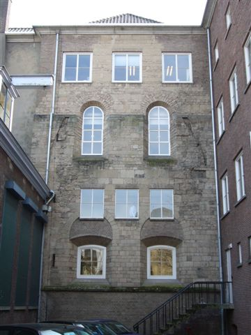 Paulusabdij